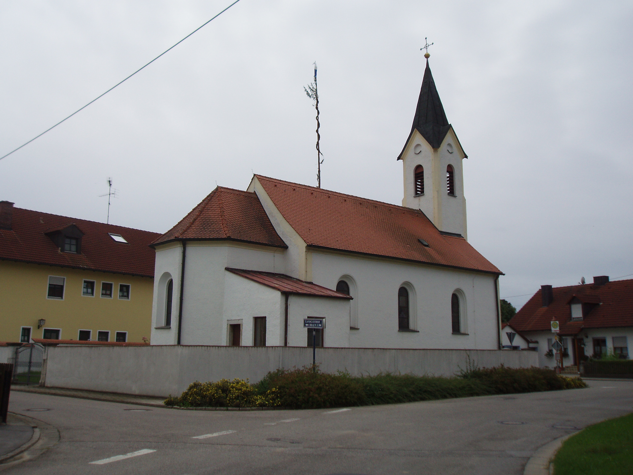 Imbath_im_Landkreis_Eichstätt,_Kirche_St._Veit